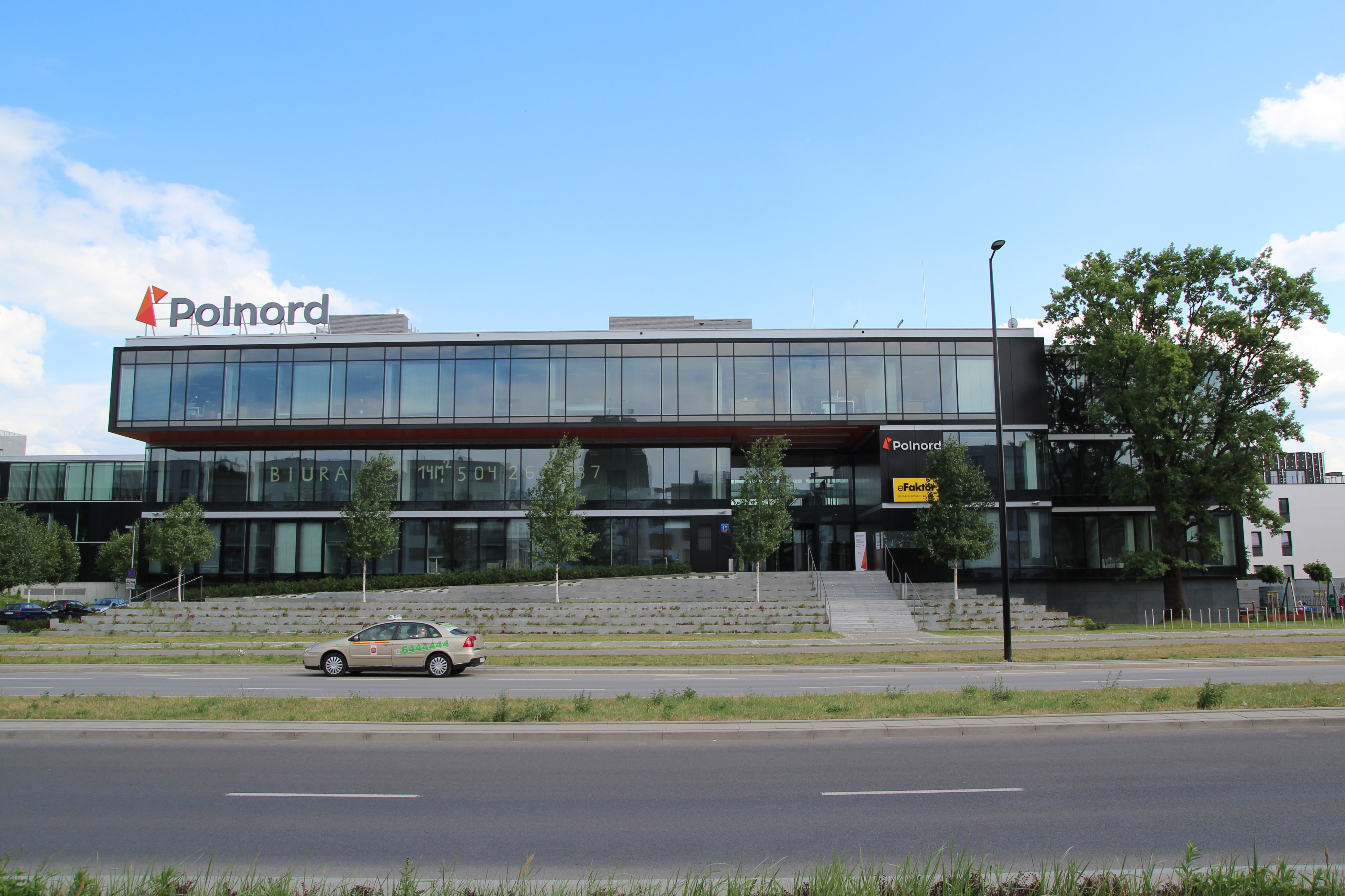 Polnord Office in Wilanów